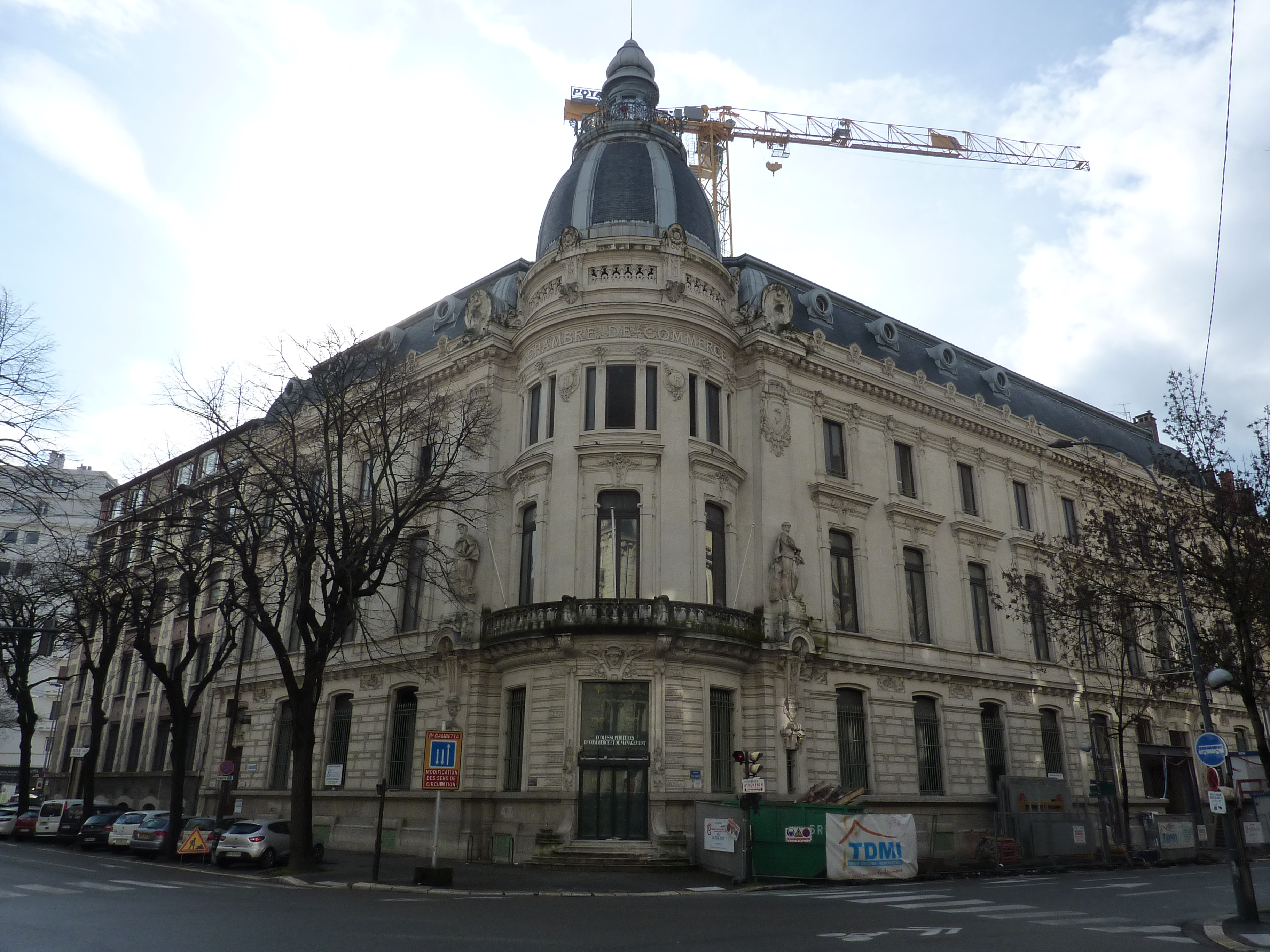 Facade de l'ancienne chambre de commerce de Grenoble.